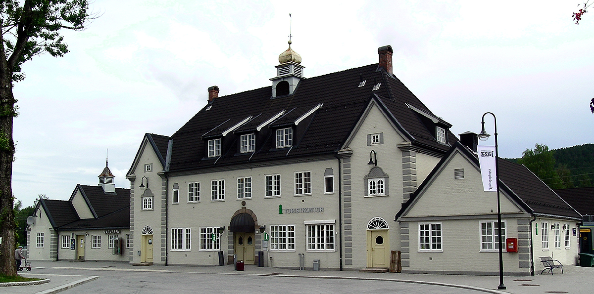 Kongsberg stasjon (bysida). Bygd 1917. Arkitekt: NSB v. Gudmund Hoel. Freda 1997.